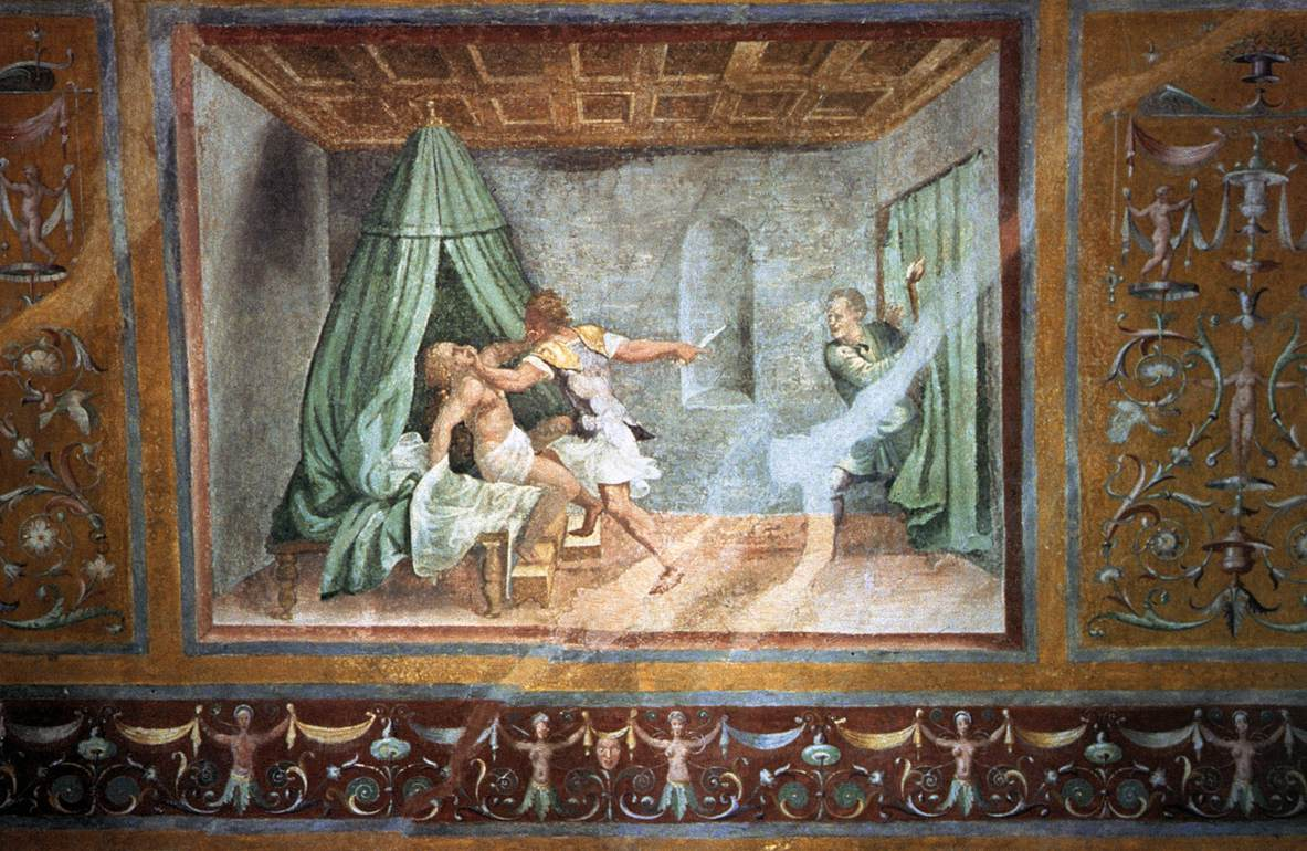 Tarquinio tenta di violentare Lucrezia, di Giulio Romano, 1536, Palazzo Ducale di Mantova.